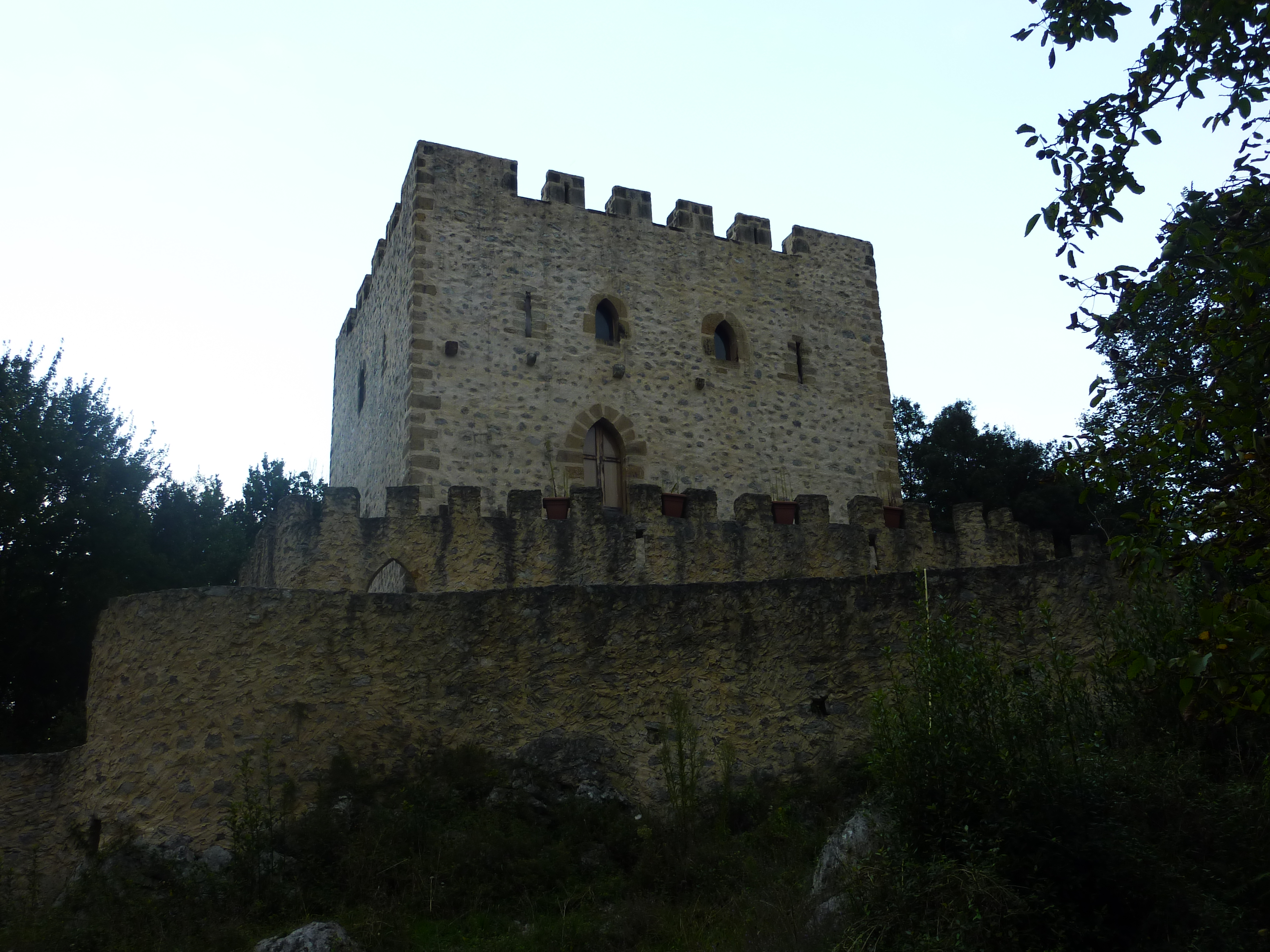 En la localidad de Castillo, término municipal de Arnuero, (Cantabria, España).